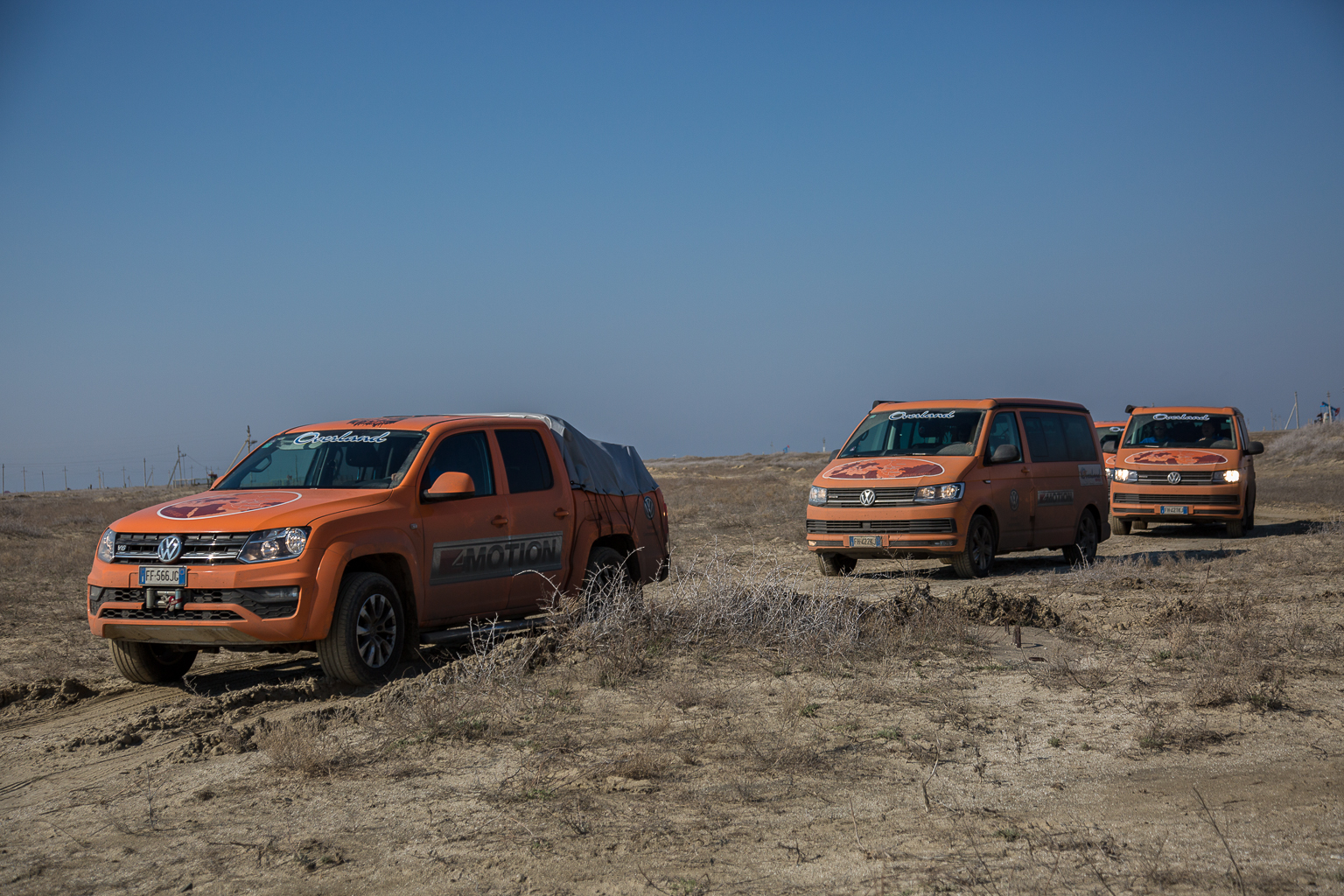 Partenza con i nuovi mezzi per Overland18